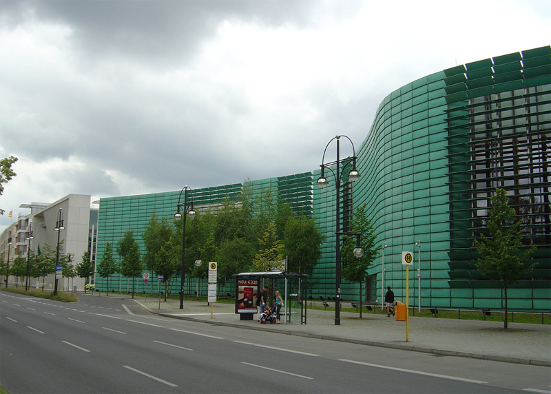 Botschaft der nordischen Länder: Schweden, Finnland, Norwegen, Dänemark Berlin